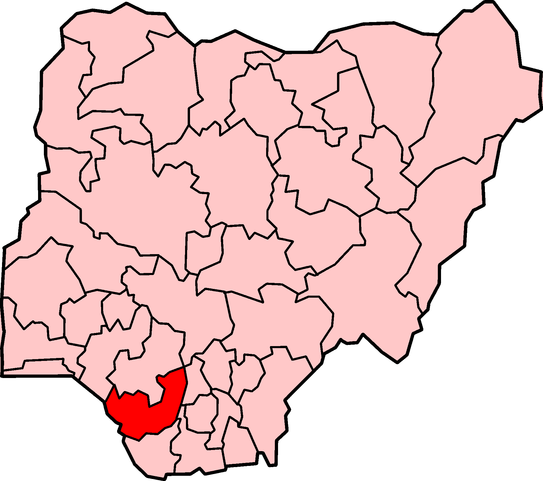 Localização do estado de Delta